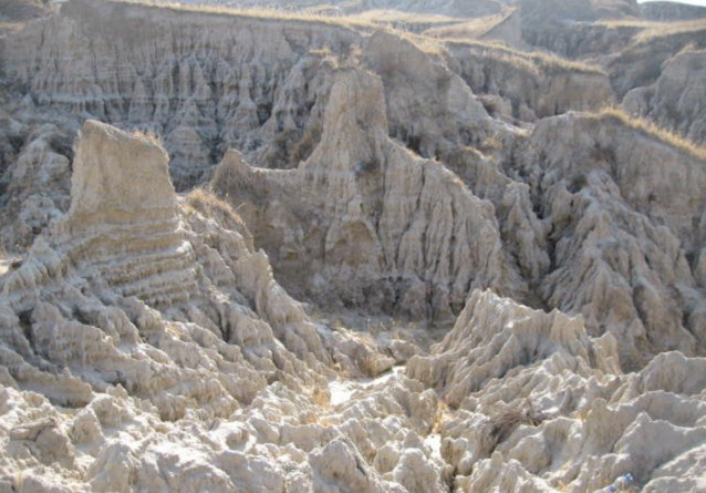 中文（中国大陆）: 吉林，乾安泥林1